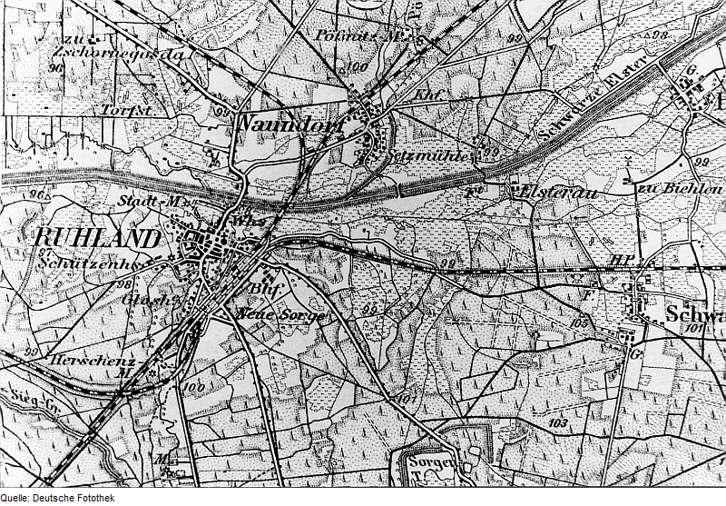 Original image description from the Deutsche Fotothek Ruhland. Karte, 1:100.000